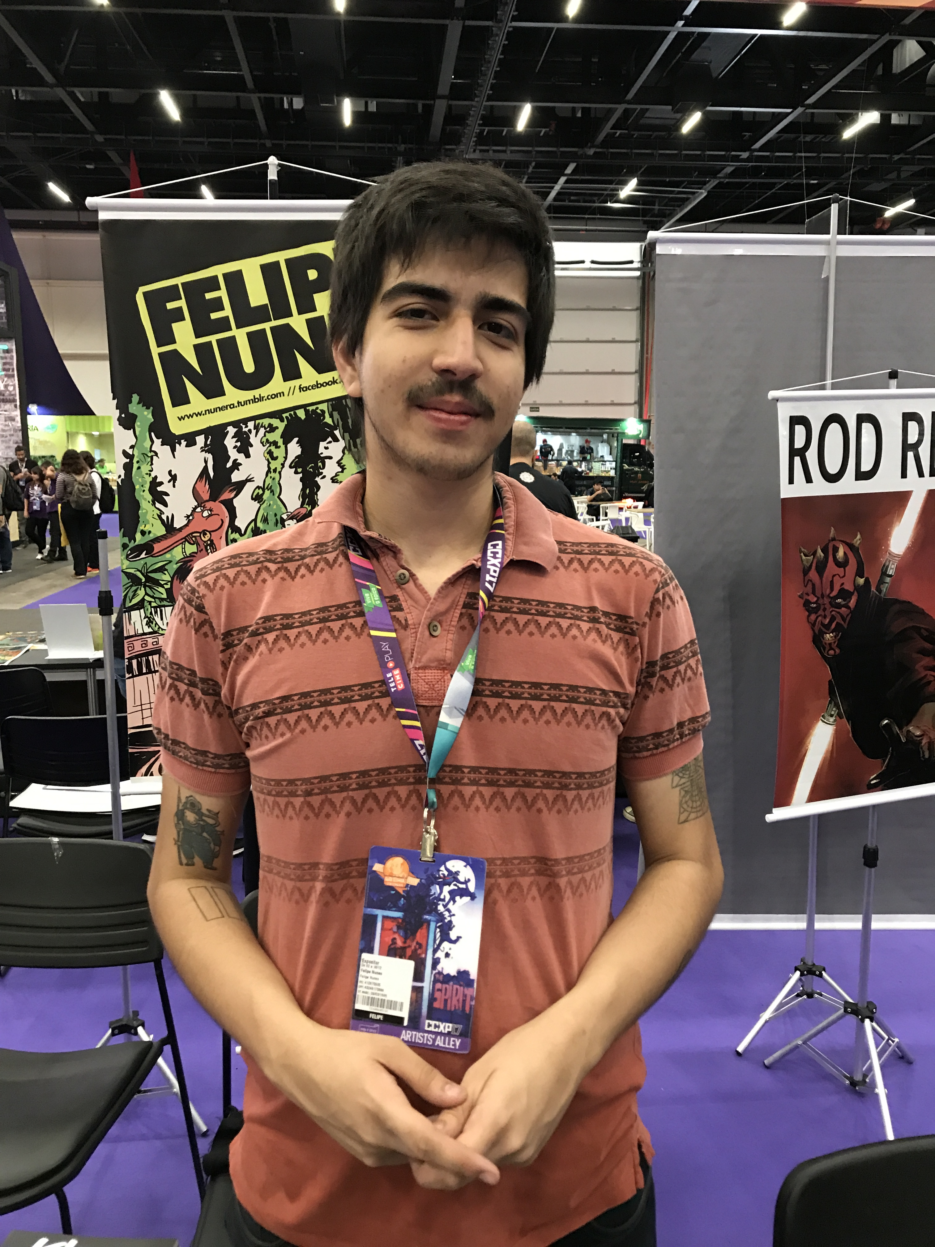 Artista Felipe Nunes na edição de 2017 da Comic Con Experience